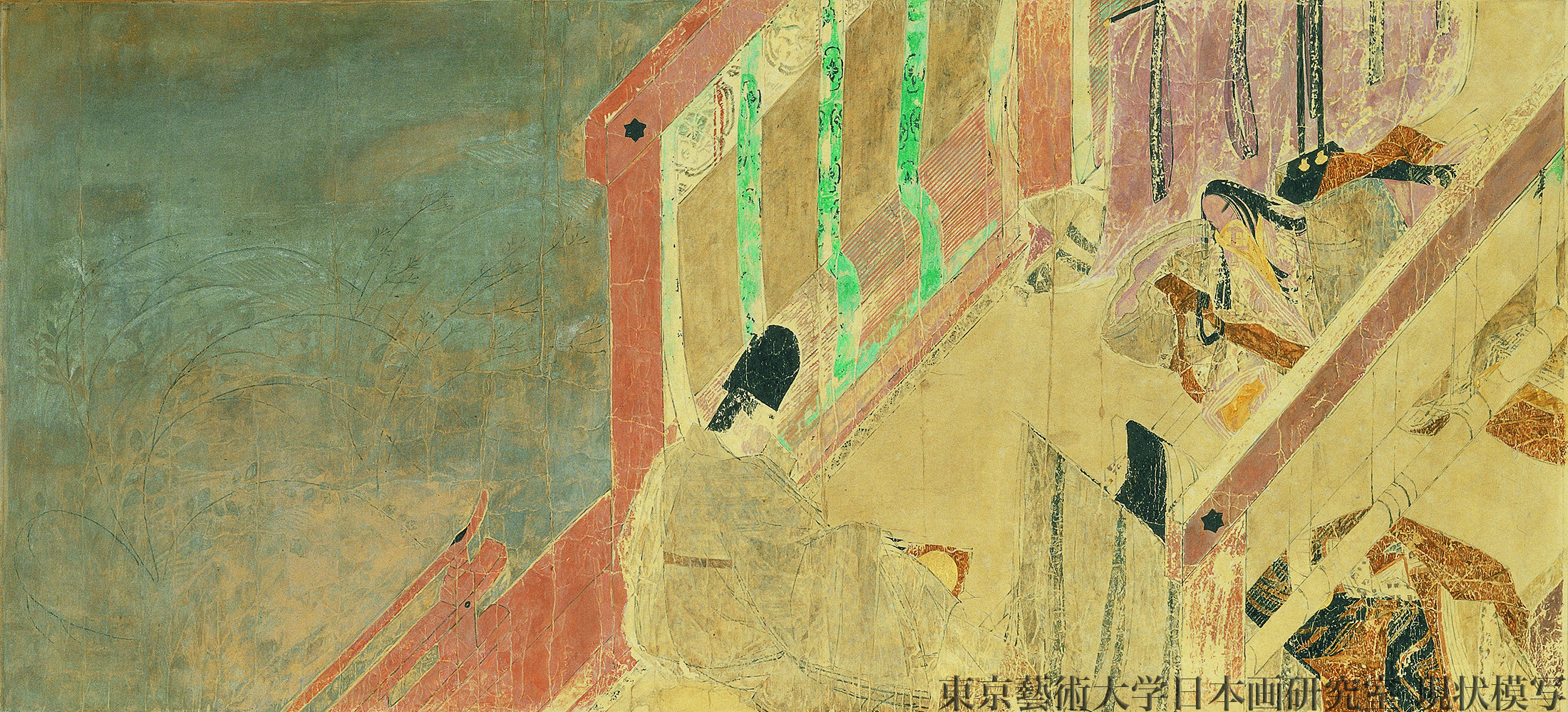 紙本著色／一面 平安時代後期・12世紀 縦21.8cm 横48.3cm 五島美術館蔵 『源氏物語』第４０帖「御法」。光源氏の最愛の妻紫上が重病にふし、源氏と明石中宮に最後の別れを告げる場面。命のはかなさを、庭に咲く萩に付いた露にたとえて和歌を詠み交わす。画面左の風に吹かれる秋草が、三人の悲しい心情を象徴。